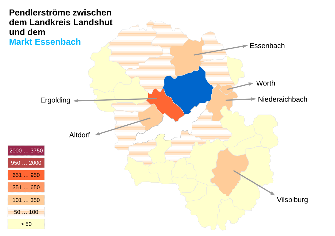 Darstellung der Pendlerströme aus den Gemeinden des Landkreises Landshut in den Markt Essenbach und umgekehrt. Das der Graphik zu Grunde liegende Zahlenmaterial datiert vom 30. Juni 2016 und stammt vom Statistik-Service Südost der Bundesagentur für Arbeit. Die Zahlen waren vom Regionalmanagement für Stadt und Landkreis Landshut im "BERICHT ZUM PENDLERAUFKOMMEN IN STADT UND LANDKREIS LANDSHUT" veröffentlicht worden.